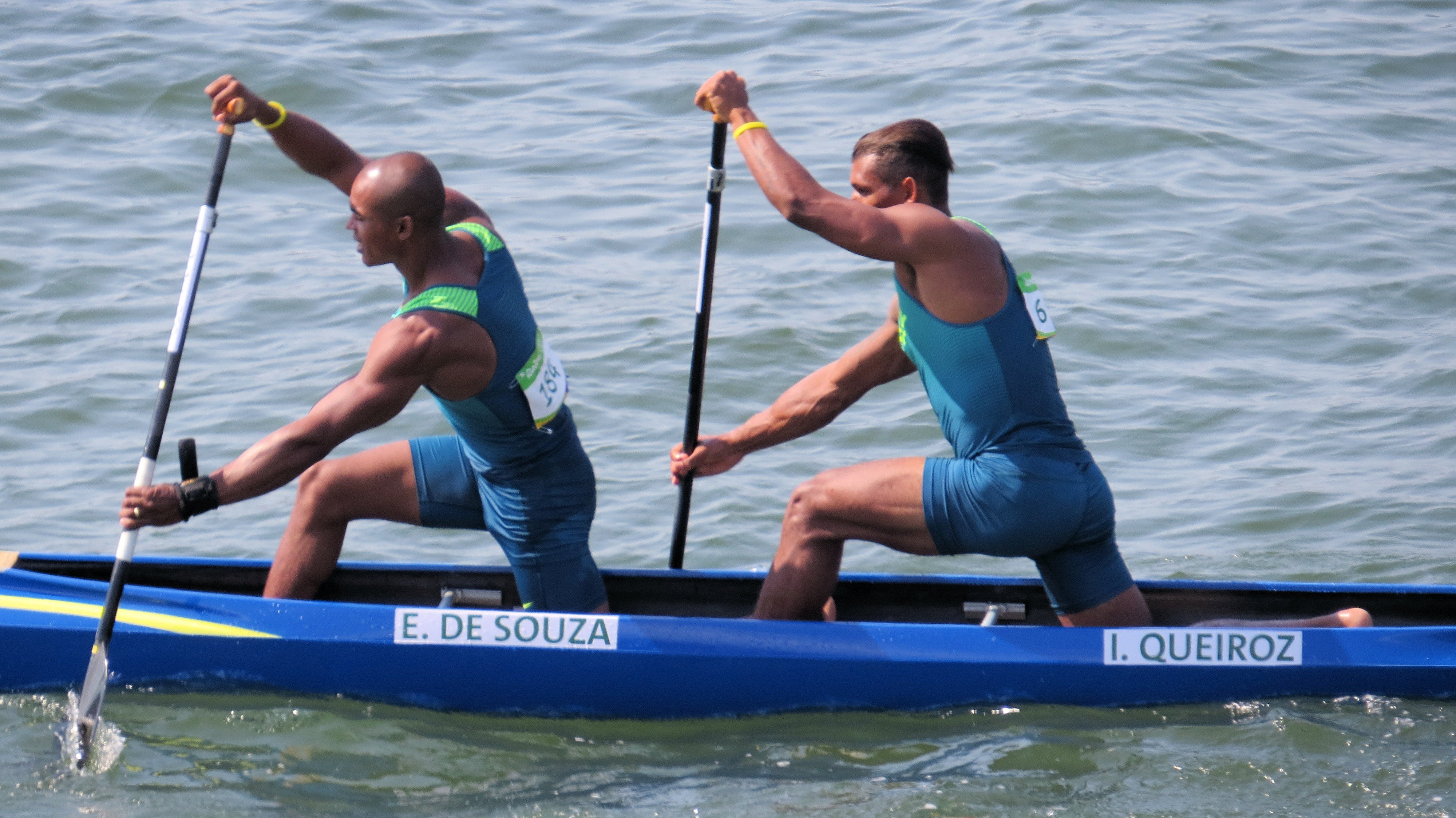 Rio 2016. Canoagem de velocidade/Canoe sprint